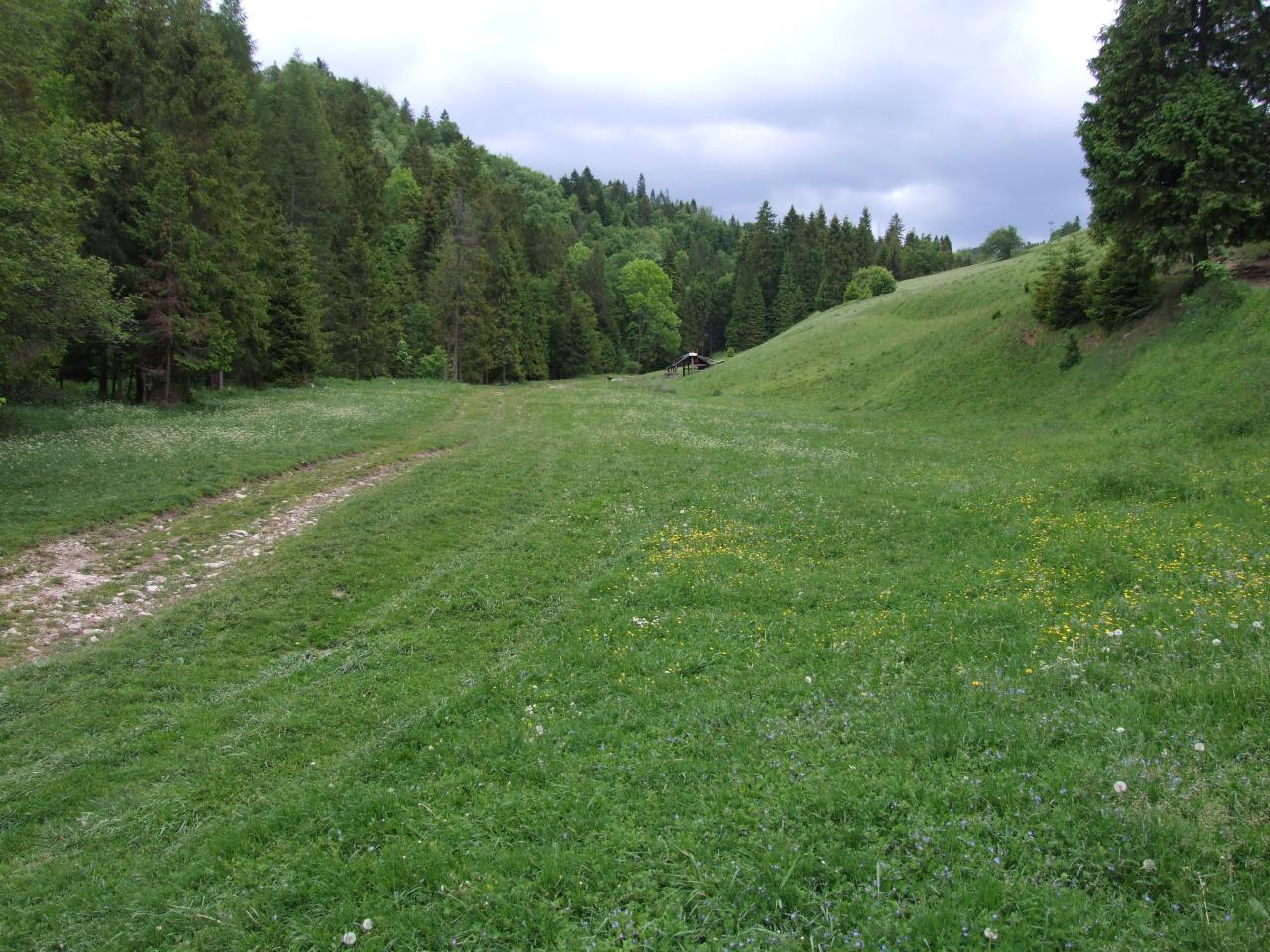 Rówienki poniżej Polany pod Wysoką w Małych Pieninach